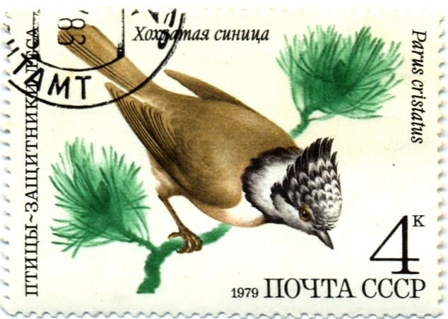 Почтовая марка с изображением хохлатой синицы (1979 год)